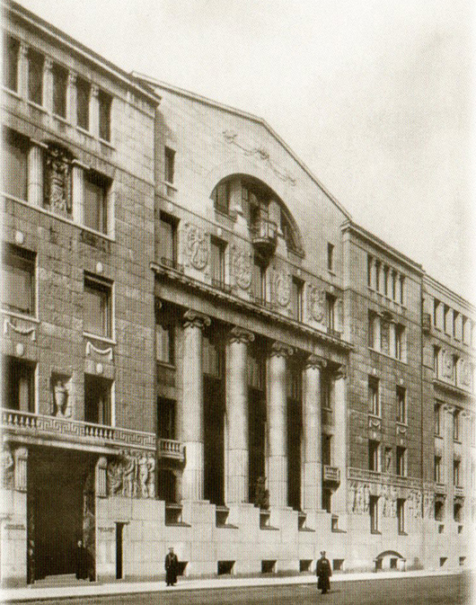 Здание Азовско-Донского банка, 1913 год.